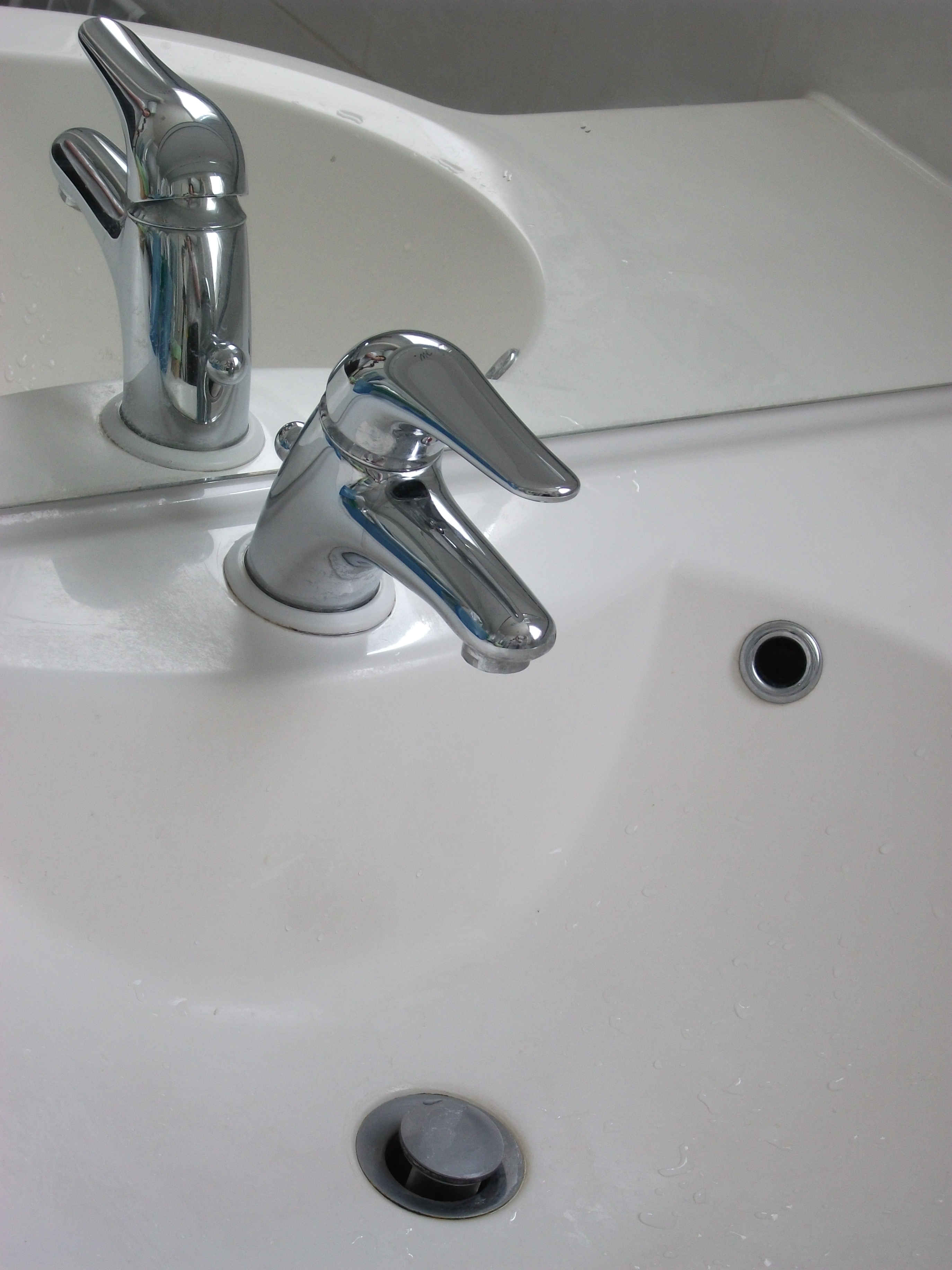 Robinet mitigeur, bonde, et trop plein dans un lavabo. La tige à l'arrière du robinet, visible dans le miroir, commande la position de la bonde en bas de l'image.